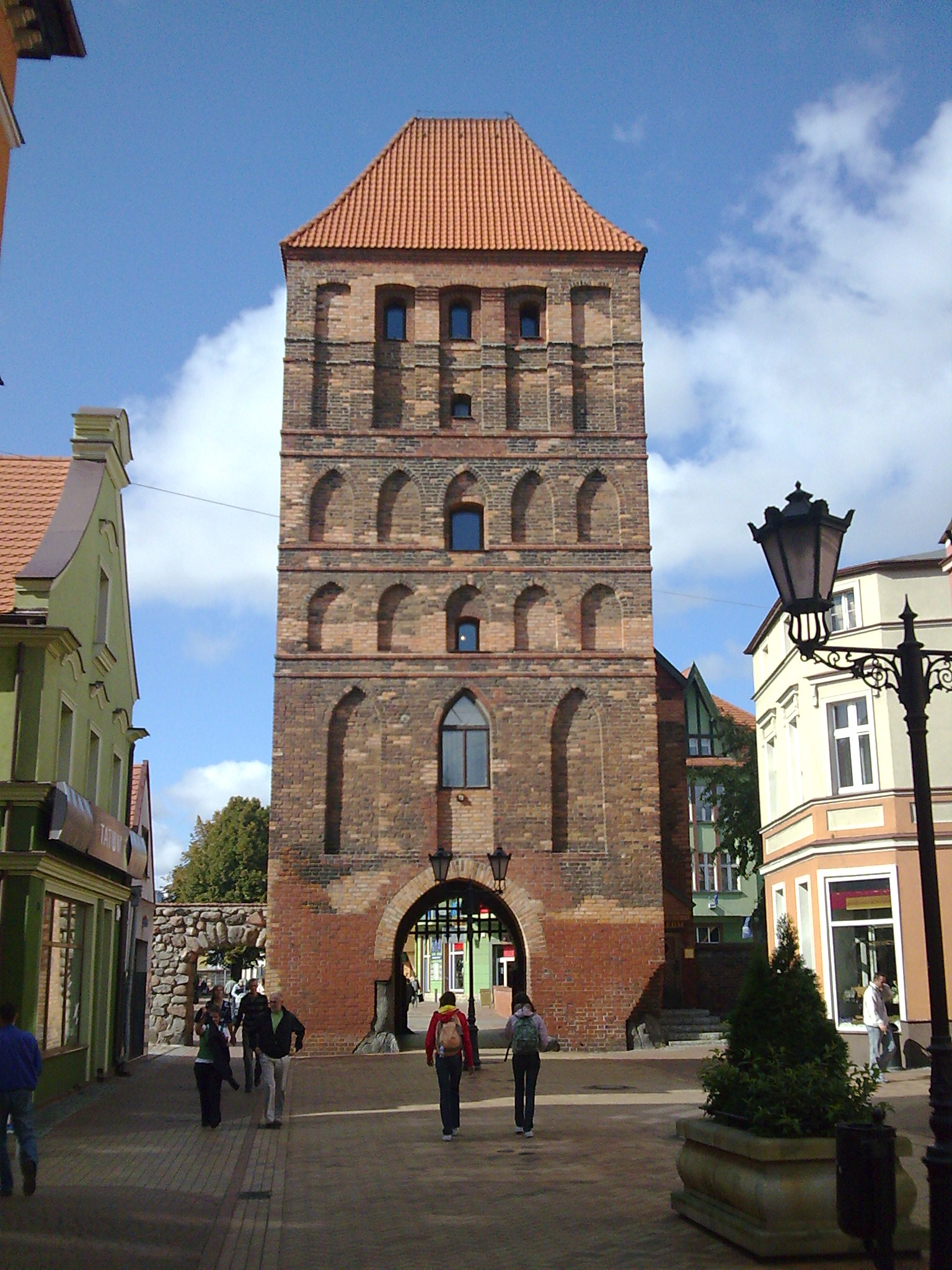 Chojnice - Brama Człuchowska, pięciokondygnacyjna brama z połowy XIV w. Obecnie Muzeum Regionalne.